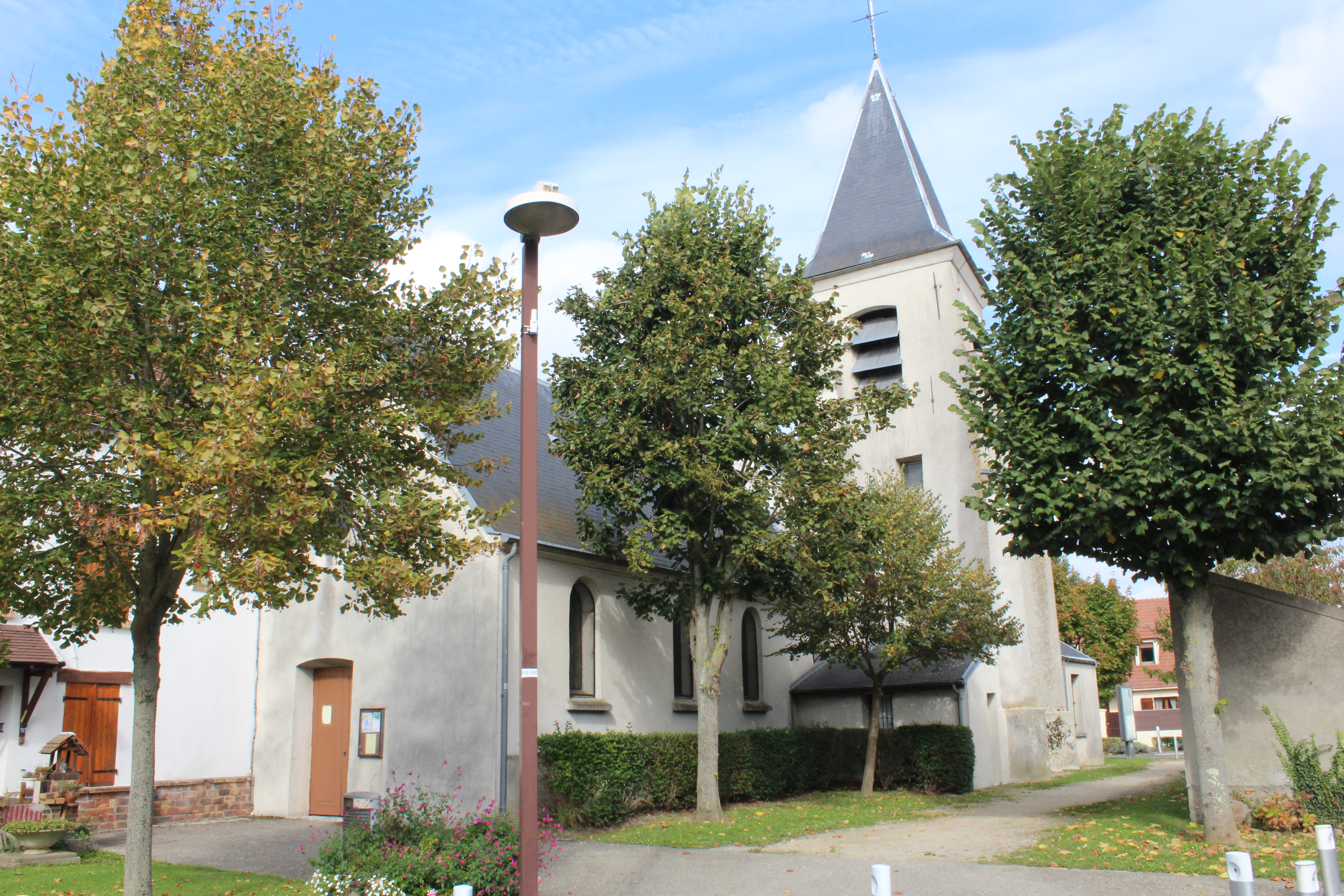 Église Saint-Rémi de Collégien, Seine-et-Marne.